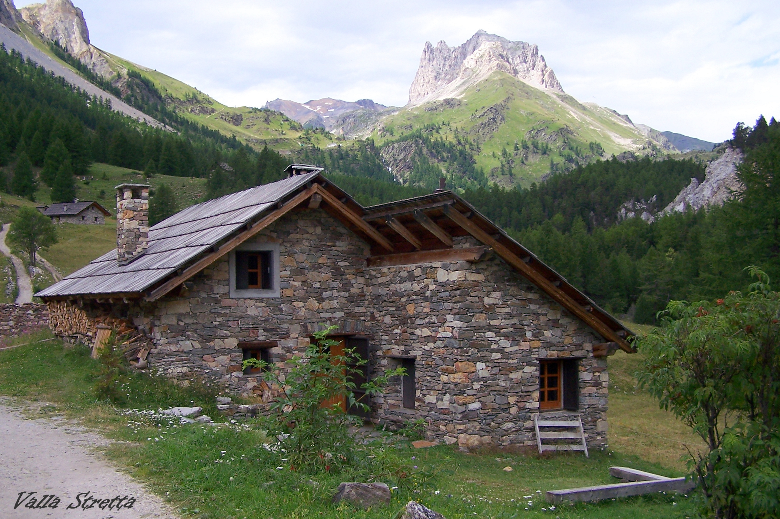 valle stretta